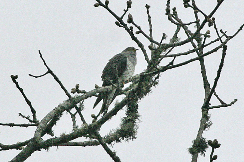 Tashigang to Norphang La